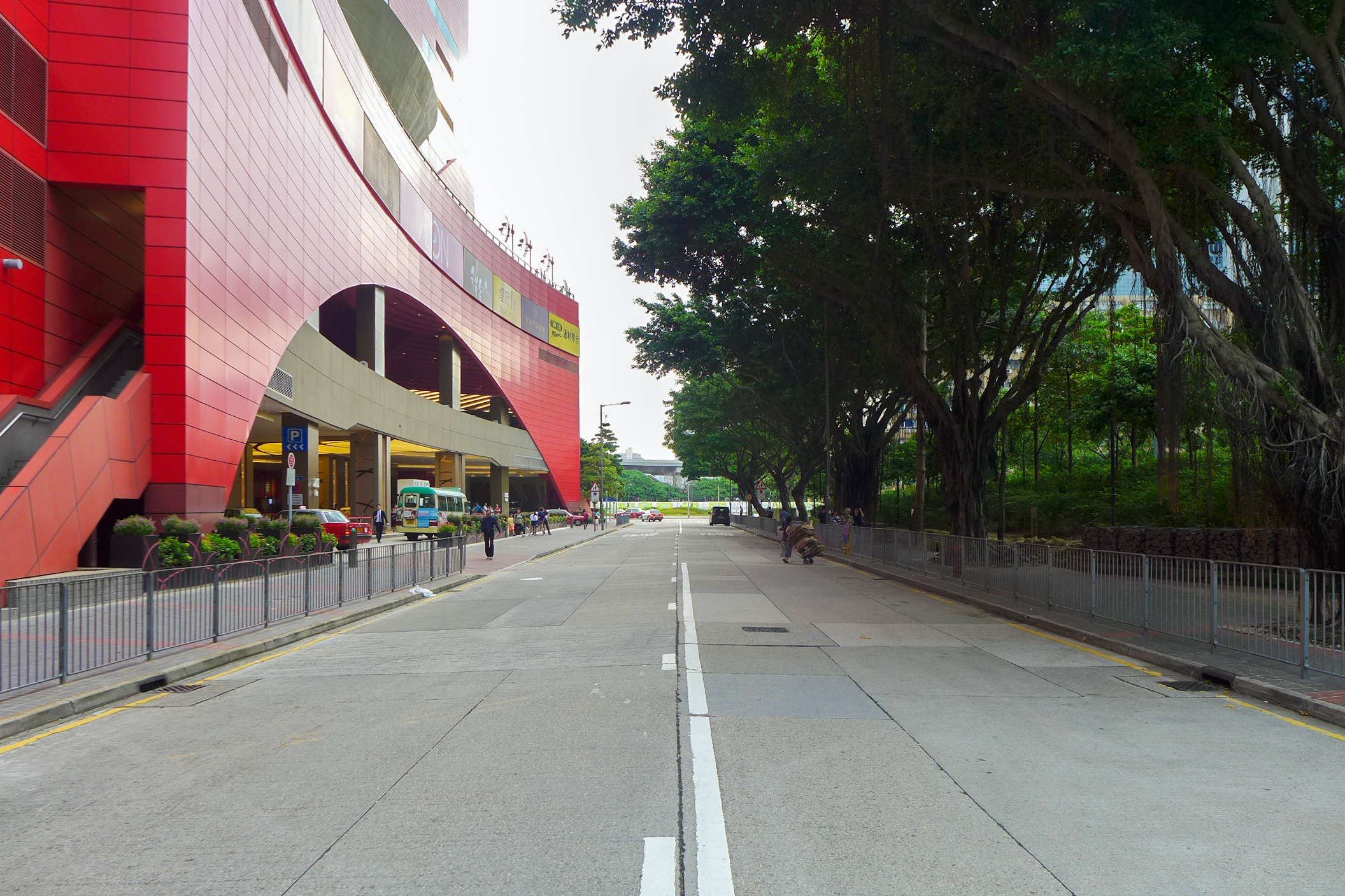 Lam Fung Street